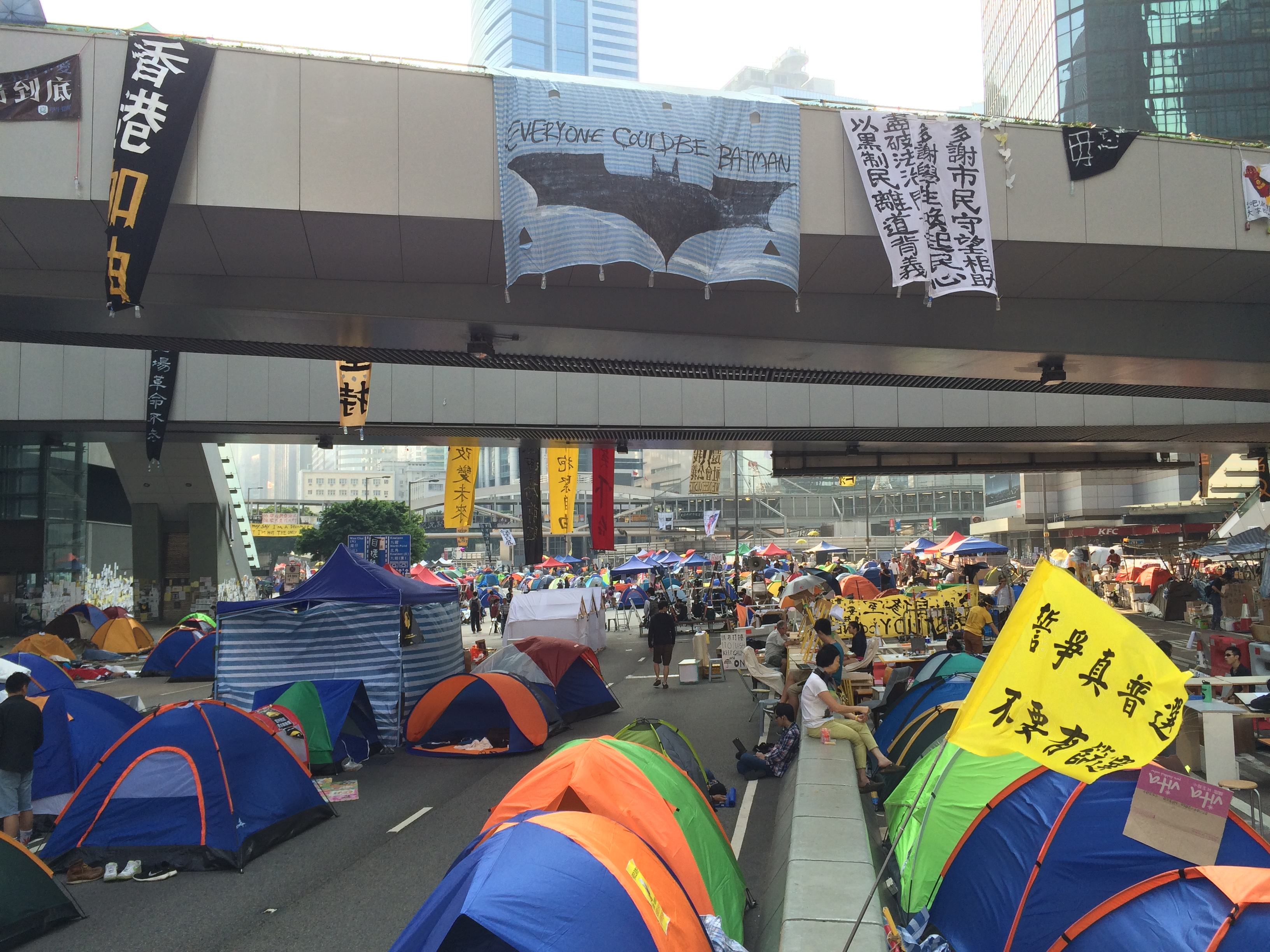 中文（香港）: 有市民在金鐘佔領區掛出「你我都是蝙蝠俠」標語，以電影《蝙蝠俠—夜神起義》比喻爭取社會公義的香港市民。